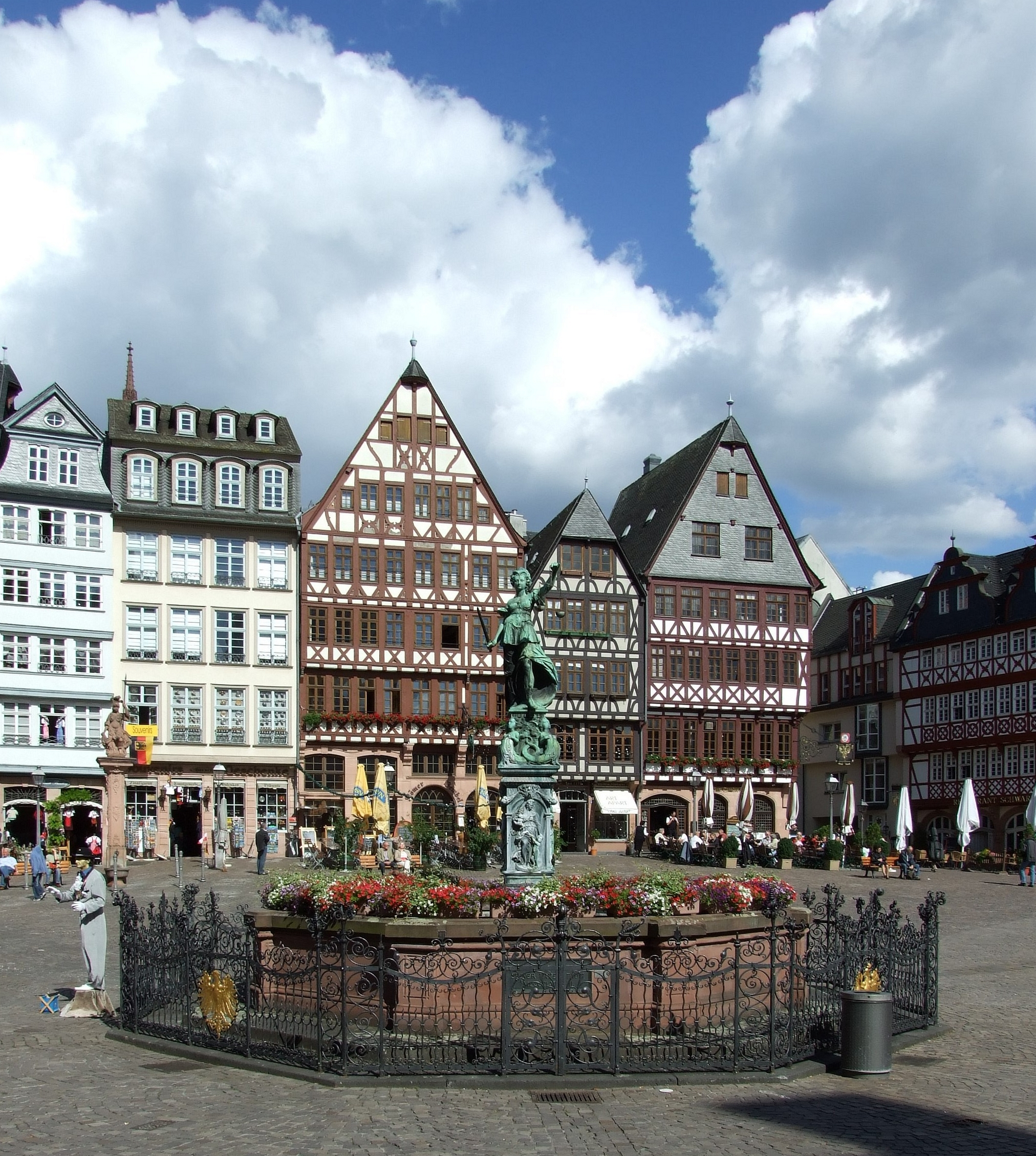 Der Gerechtigkeitsbrunnen auf dem Roemerberg in Ffm